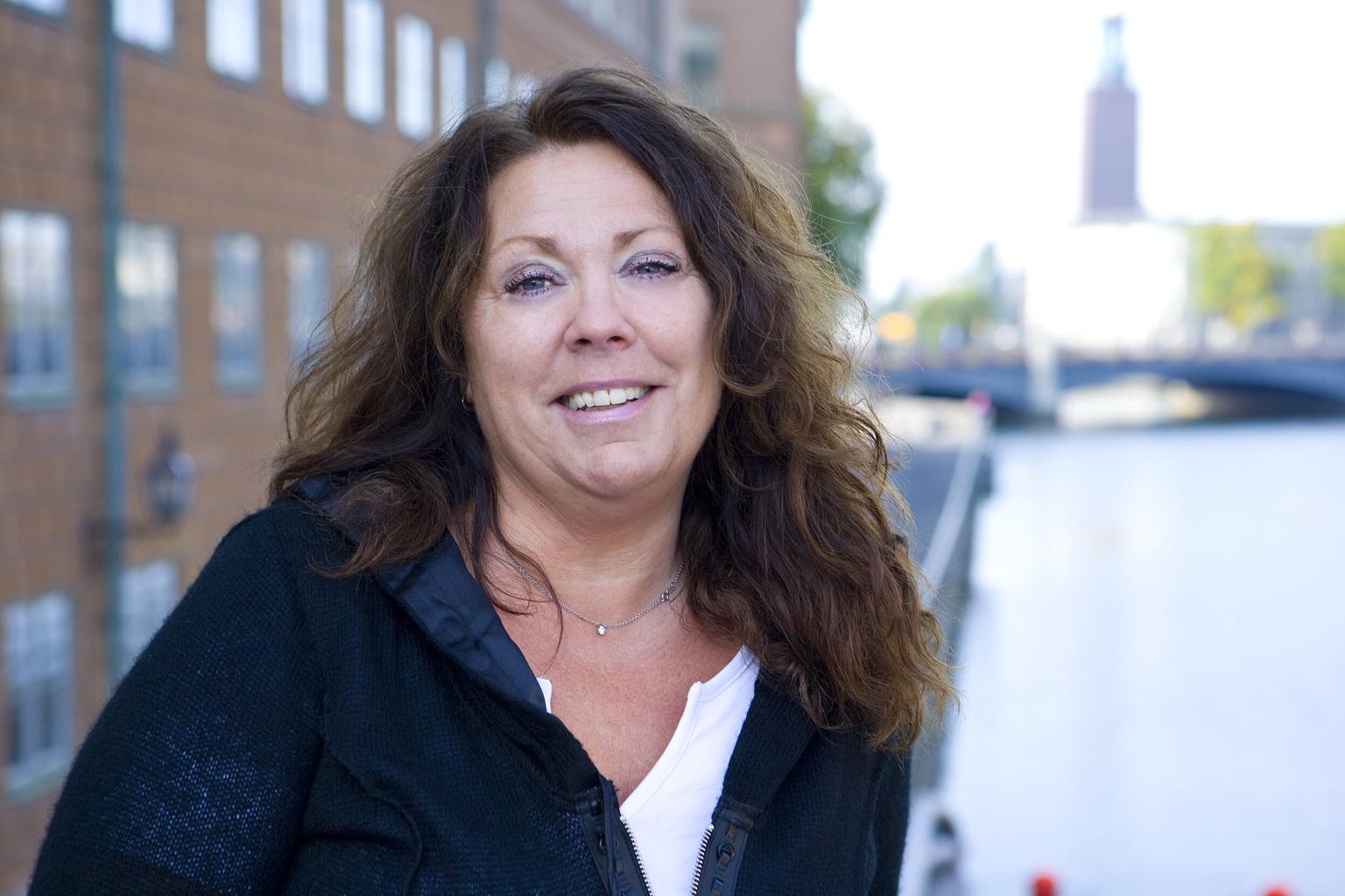 kornevik-jakobsson_maria_02